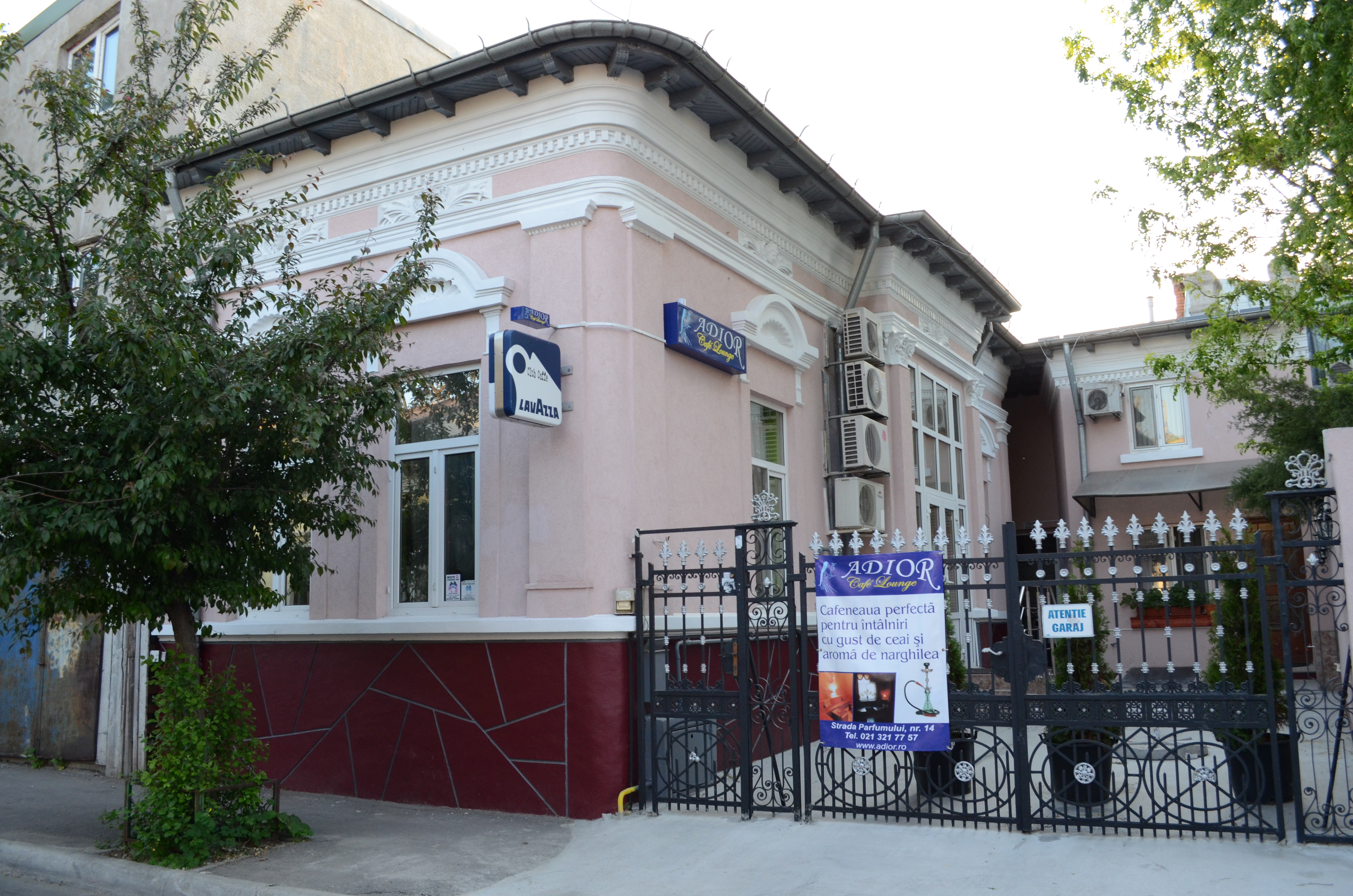 Casă, Strada Parfumului nr. 14, Sector 3, București